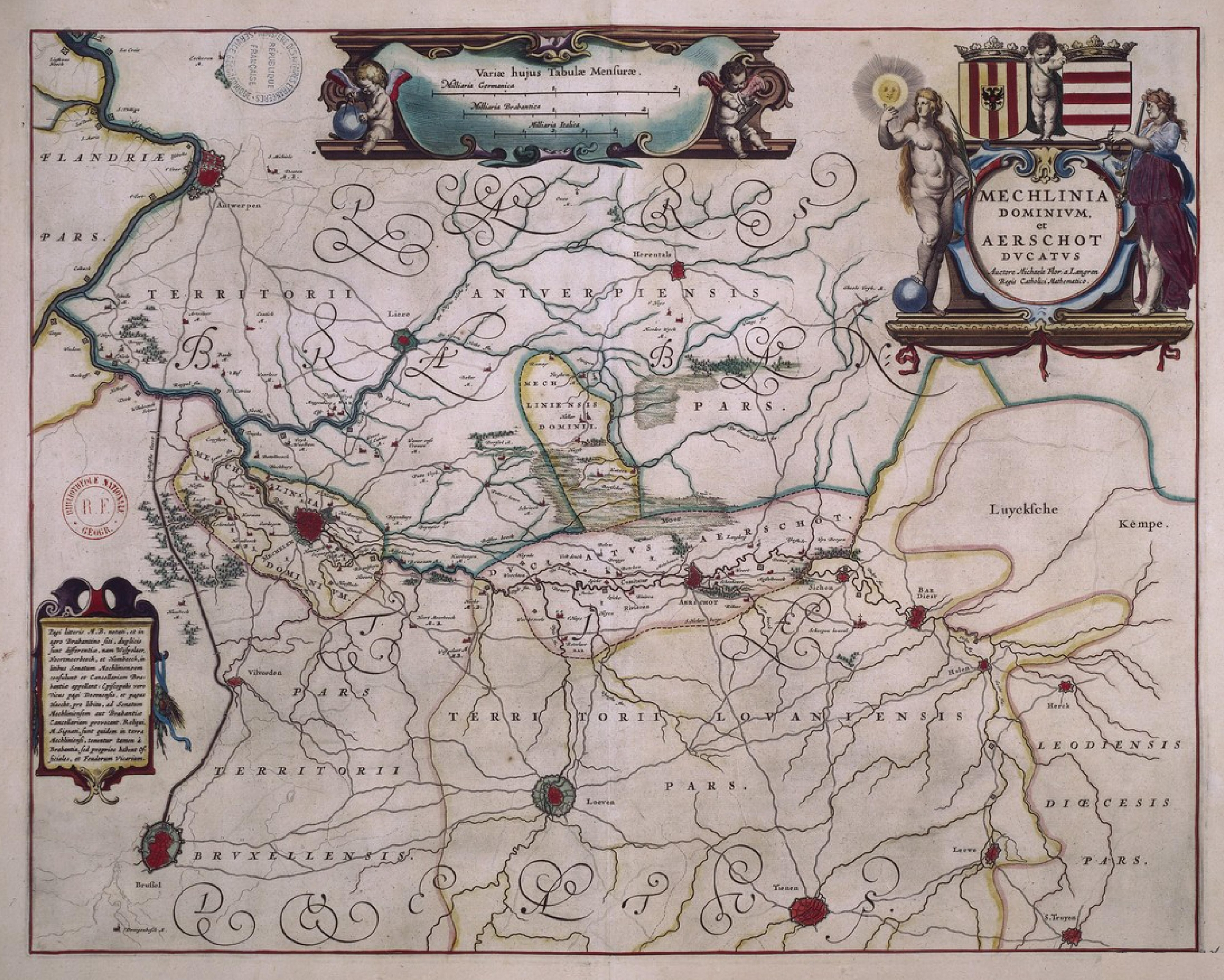 Mechlinia dominium et Aerschot ducatus